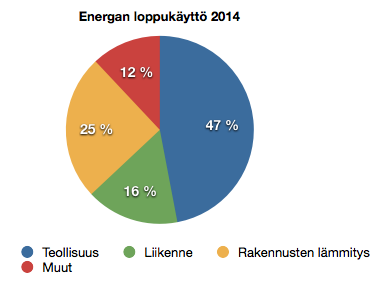 Energian loppukäyttö Suomessa sektoreittain 2014. Lähde